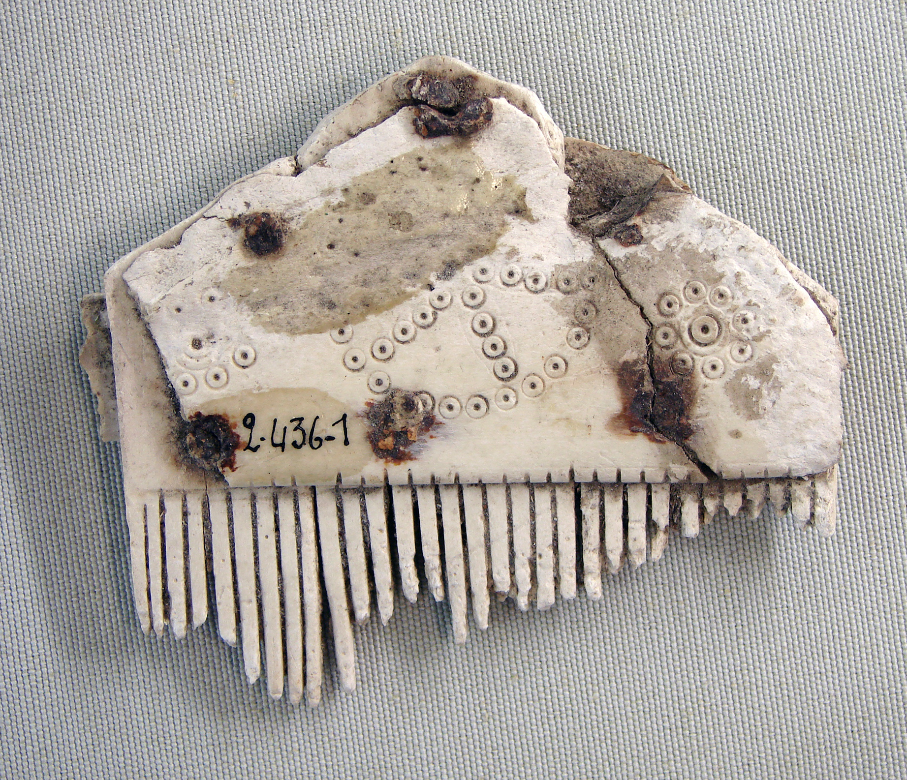 Peigne en os. Fait partie du matériel d'une tombe masculine (la tombe I) à Monceau-le-Neuf dans l'Aisne. Epoque gallo-romaine, 400 + JC. Musée de Laon.